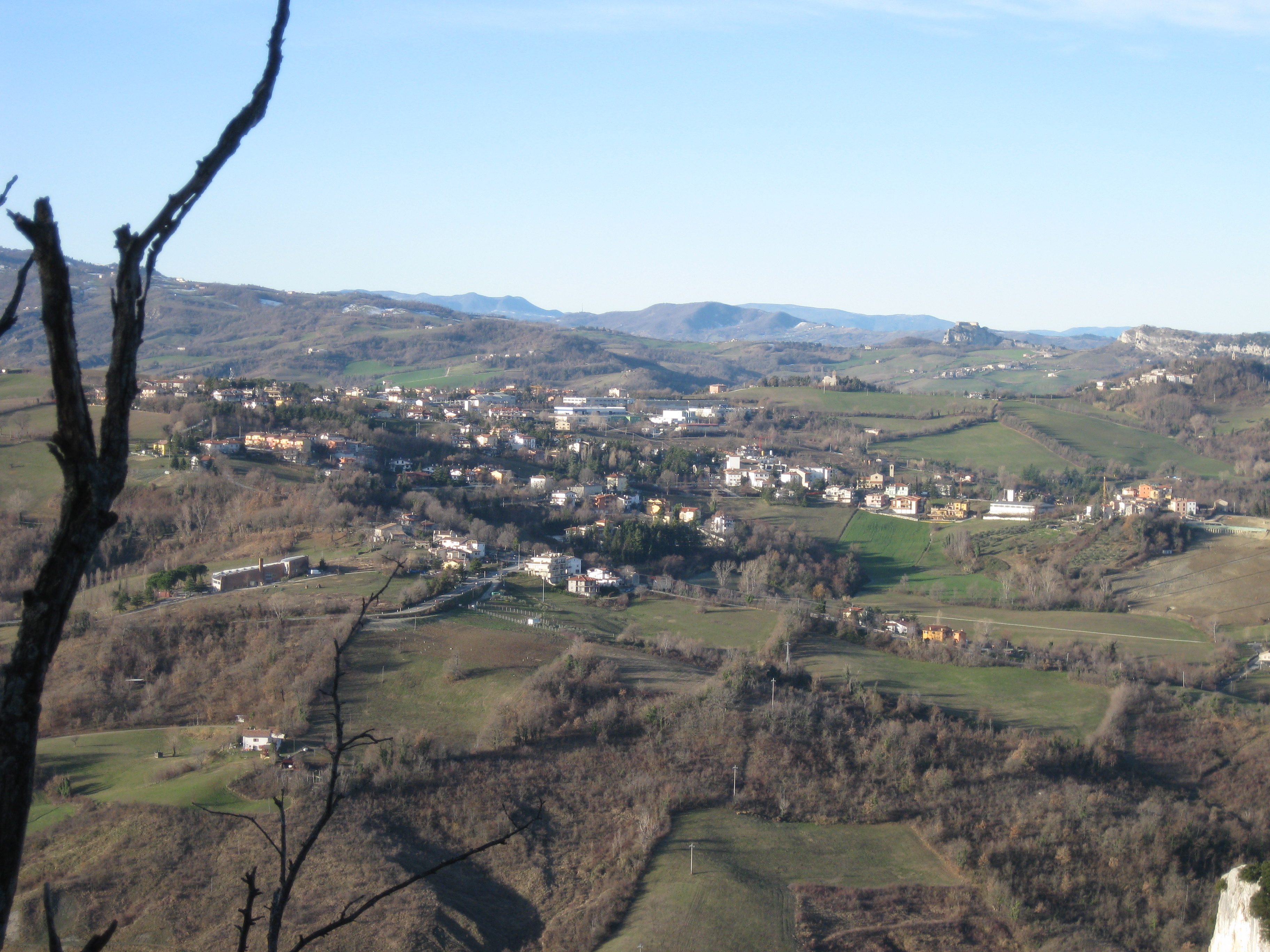 Chiesanuova, San Marino